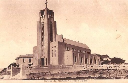 Église de Mégrine en Tunisie dans les années 1930